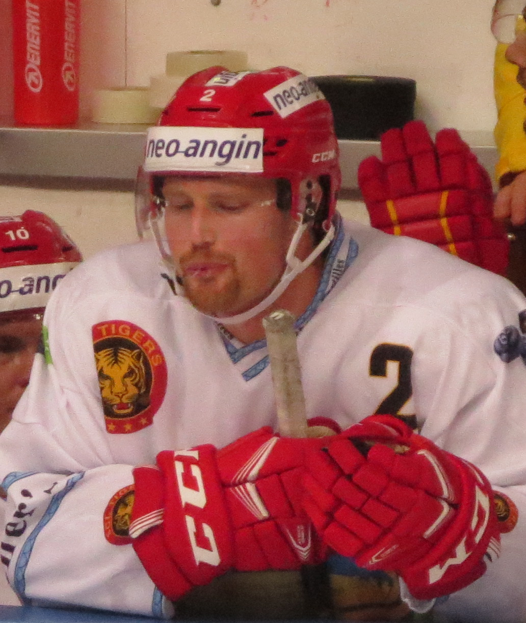 Match entre les Dragons de Rouen et les Tigers de Langnau le 8 août 2017 au Sentier (Hockeyades) 2 Lardi Federico 72 Erni Samuel